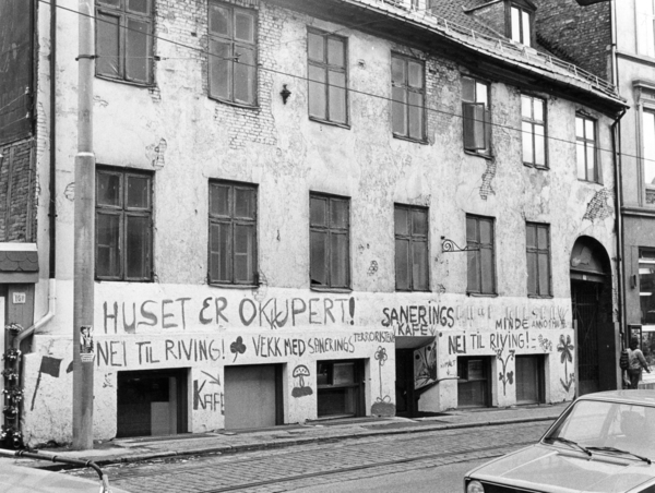 Foto av hus som er okkupert i protest mot sanering.